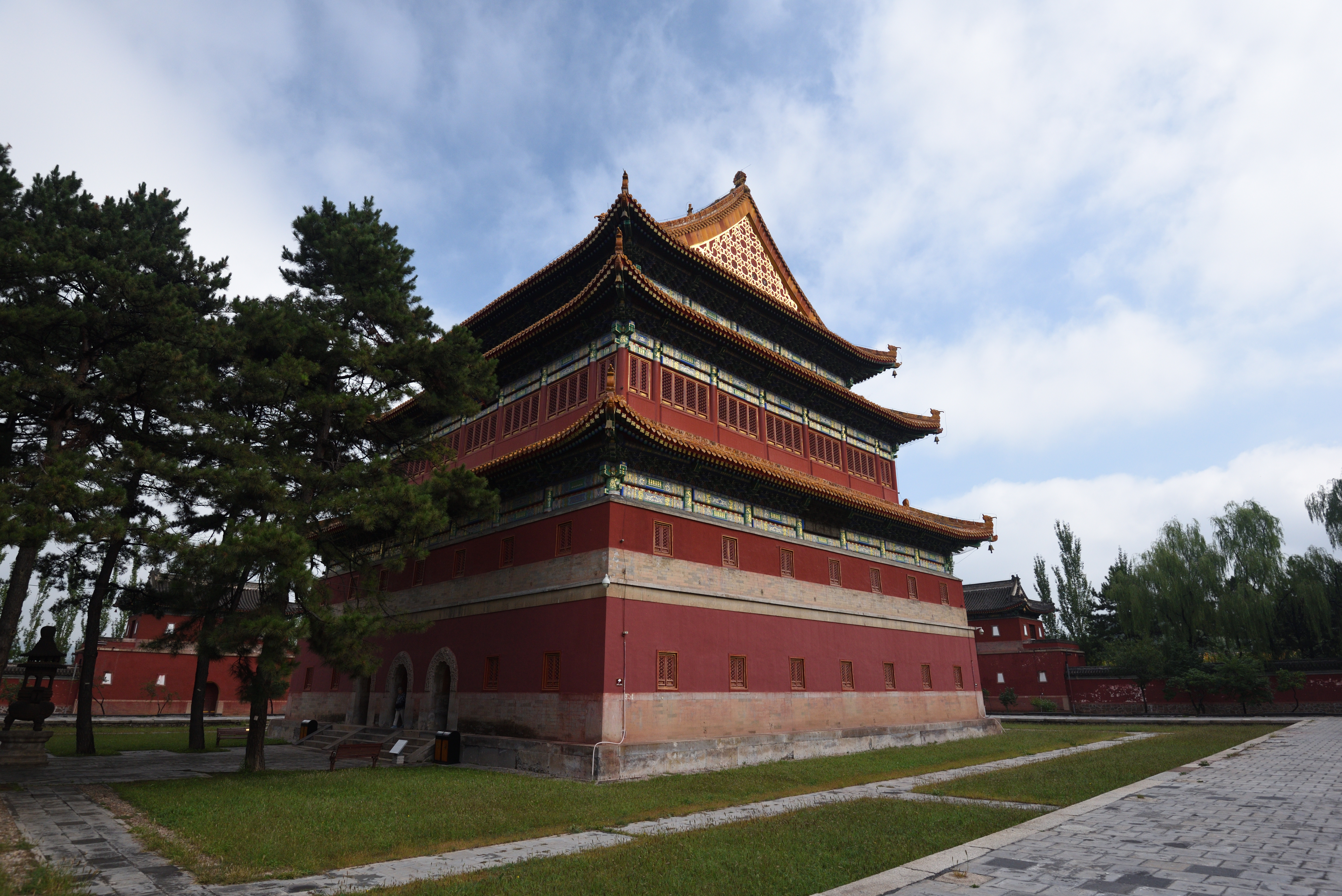 承德安远庙